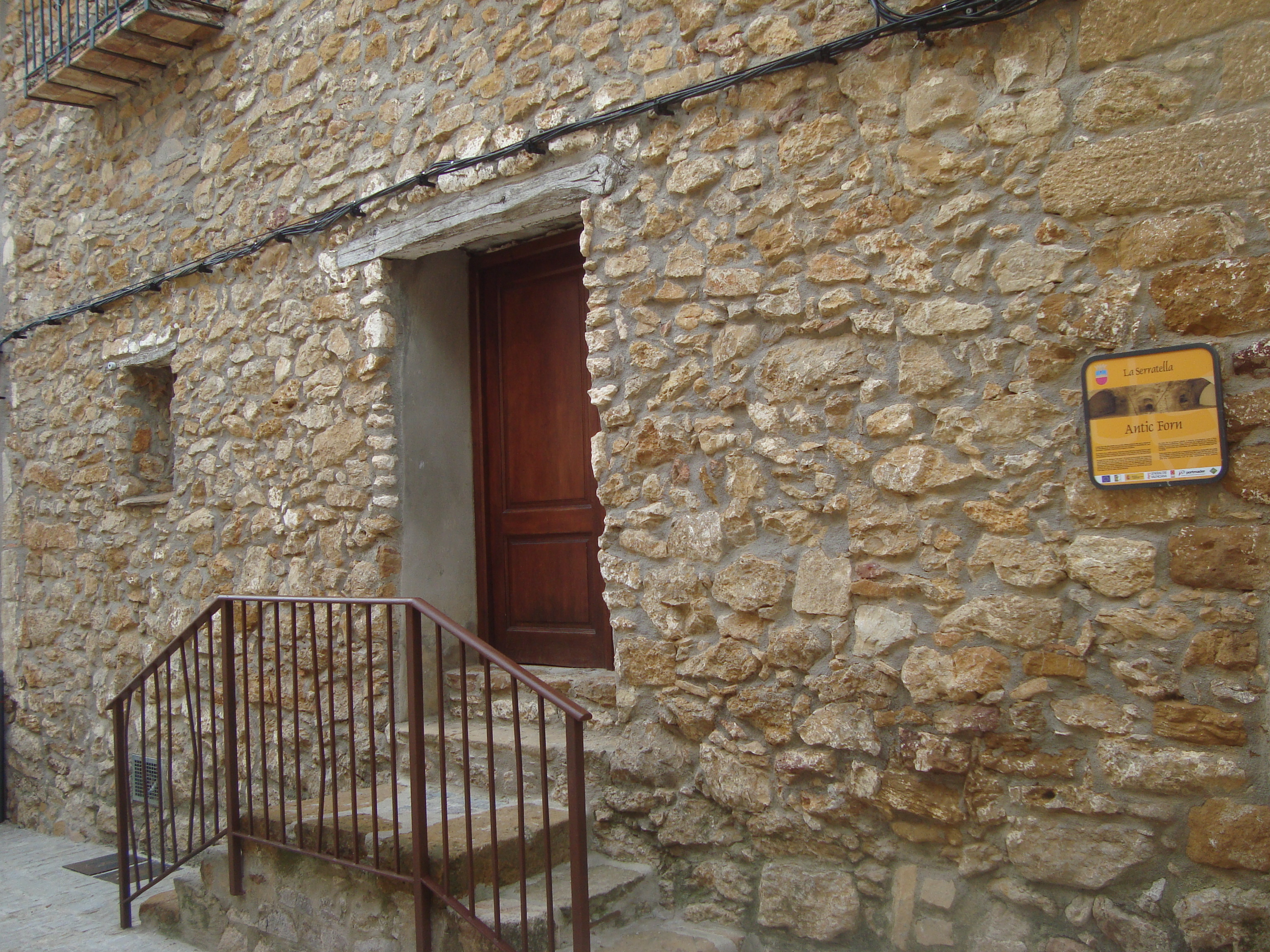 El edificio del antiguo horno de pan de leña de la Serratella, es en la actualidad un edificio con una relevante importancia arquitectónica. Posee unas claras trazas medievales, donde destacan principalmente dos arcadas integradas en la nave principal. A principios del siglo XX era utilizado como escuela. Se cree que este edificio era, en la época medieval el ayuntamiento, aunque no se ha encontrado, por el momento, ningún documento que lo acredite.